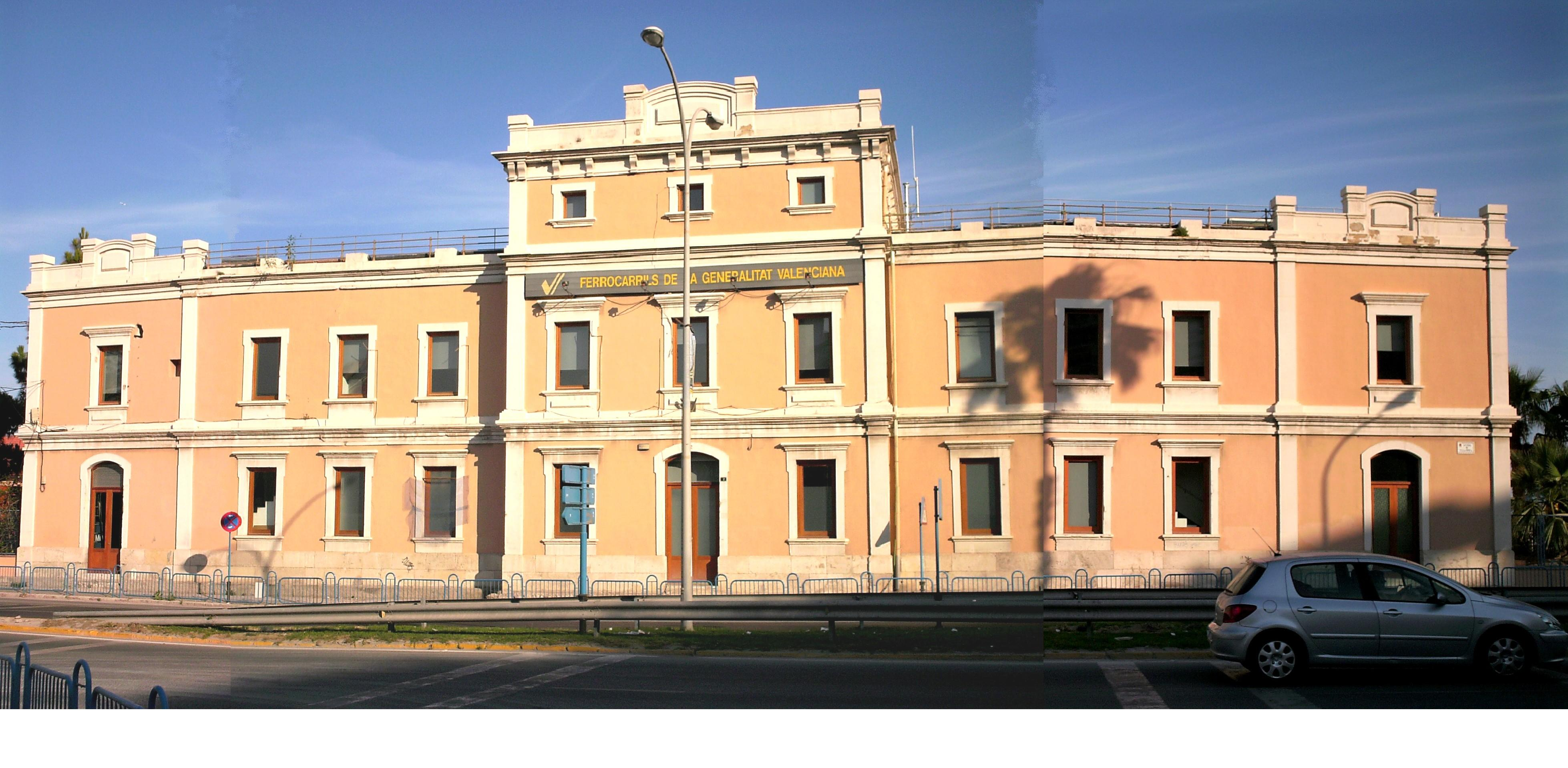 Gebäude des alten Bahnhofs Alicante - La Marina / Edificio de la antigua estación Alicante - La Marina